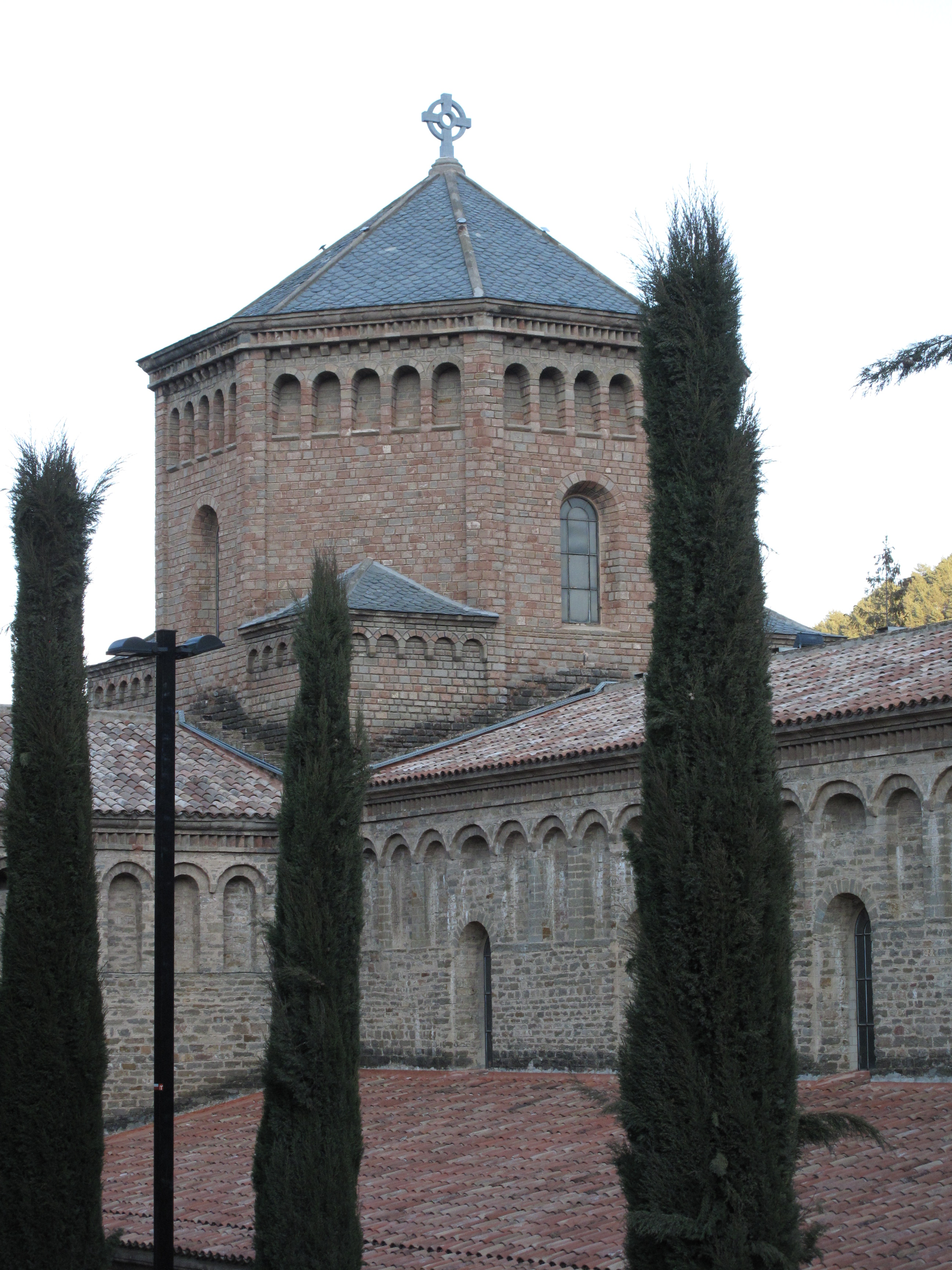 Santa Maria de Ripoll, el cimbori entre els arbres